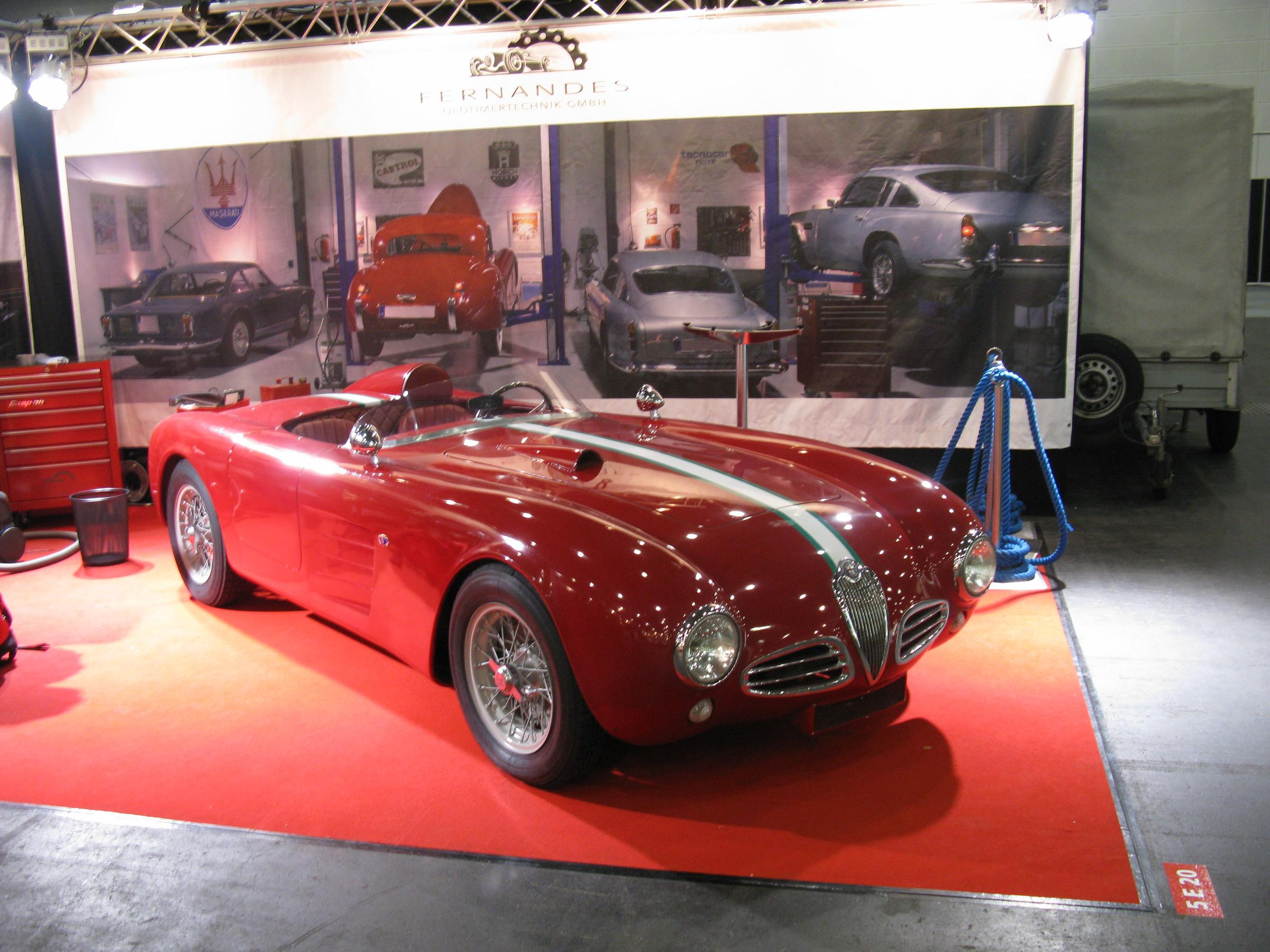 Alfa Romeo